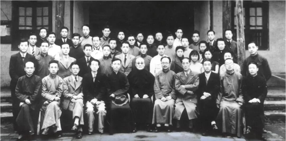 中文（中国大陆）: 1939年秋张伯苓与国立西南联合大学部分师生合影